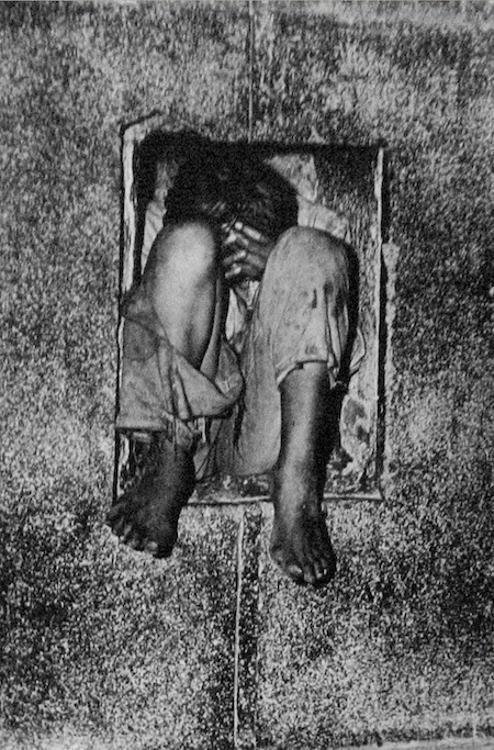 México, D.F., 1953. Archivo fotográfico Héctor y María García